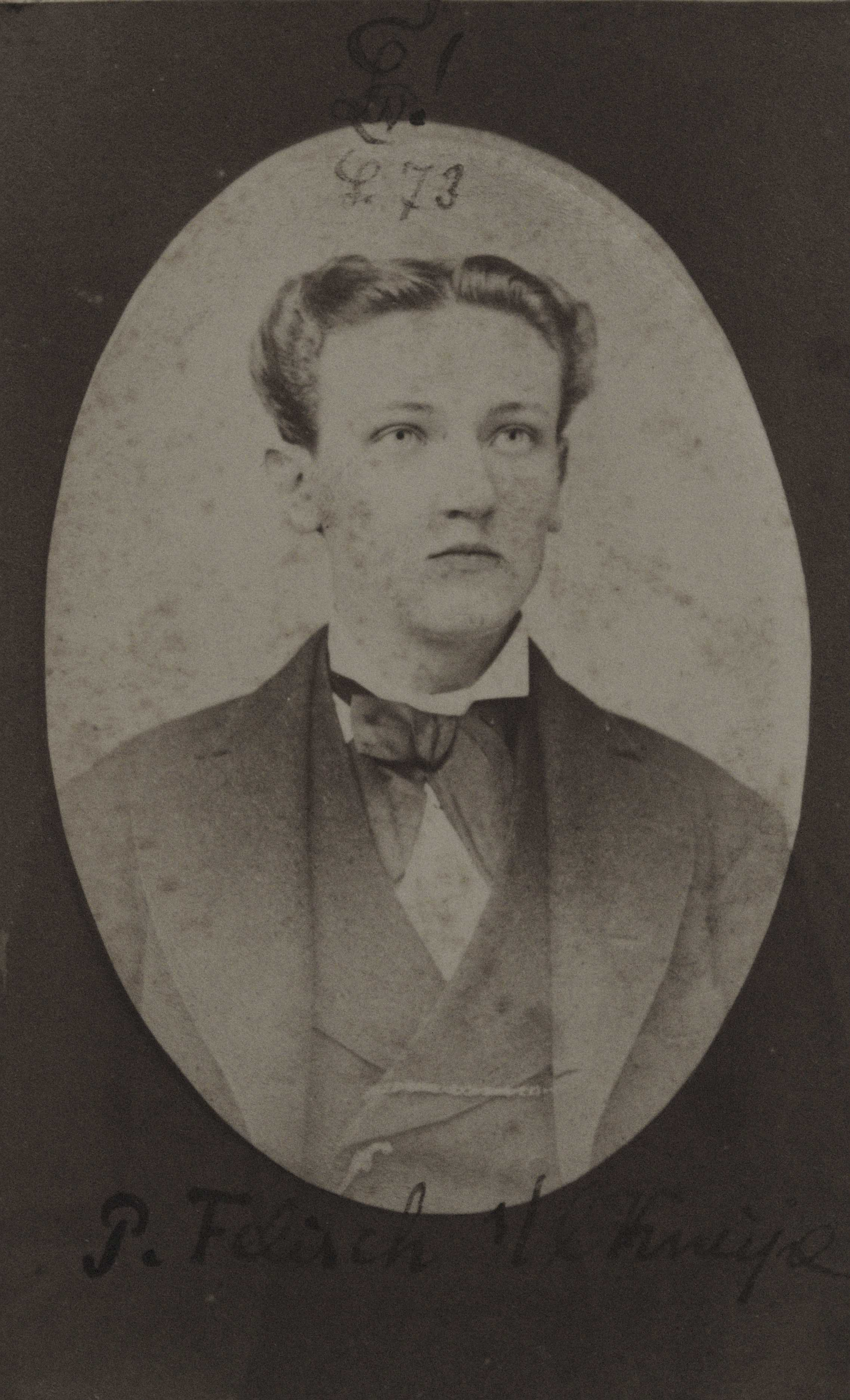 Fotografie von Paul Felisch. Standort: Ahnengalerie im Conventszimmer der Verbindung Leonensia. Aufgenommen am 23. Juni 1874. Beschreibung: Oben befindet sich der Zirkel der Verbindung Leonensia und das Eintrittsdatum von Felisch zur "L[eonensia] [18]71". Unten steht "P. Felisch s[einer]/l[ieben] Kneipe"